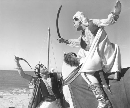 Fotogramma Lo sceicco bianco di Federico Fellini